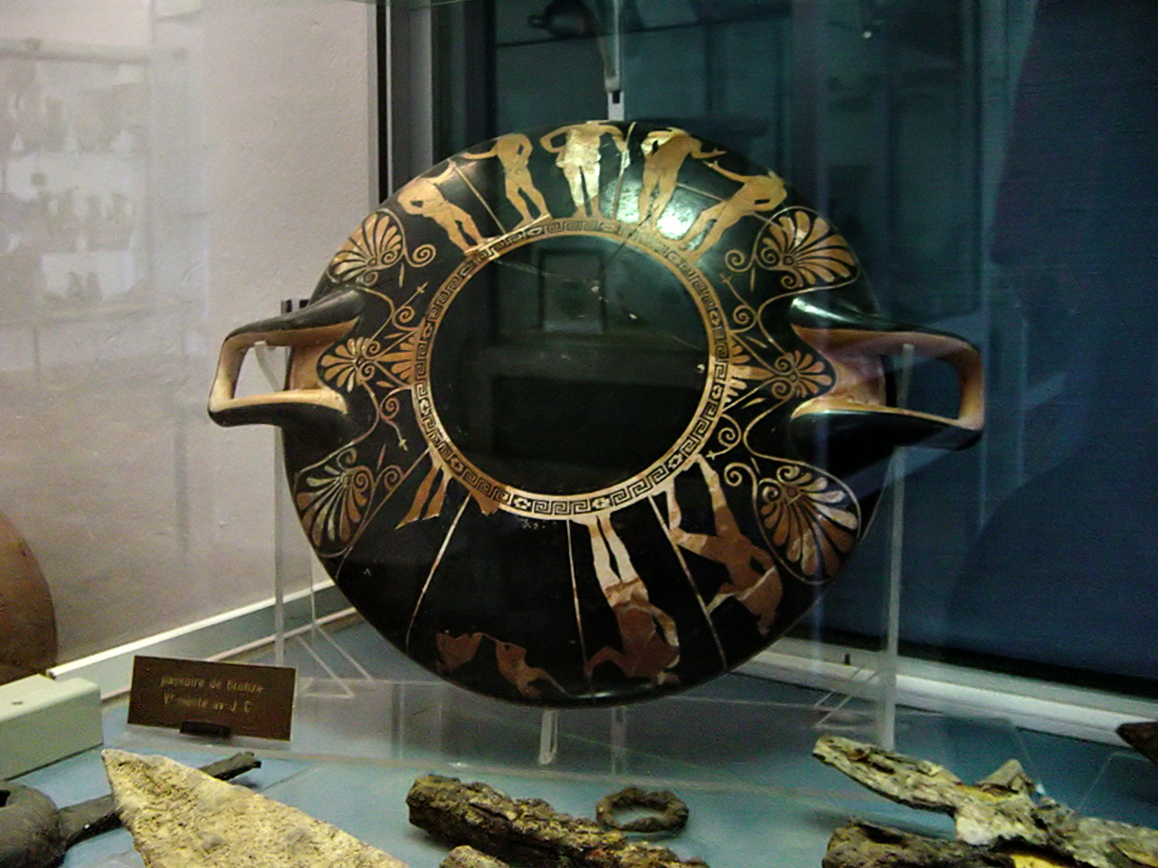 Aléria (Corsica) - Pièce exposée au musée départemental d'archéologie Jérôme Carcopino au fort de Matra